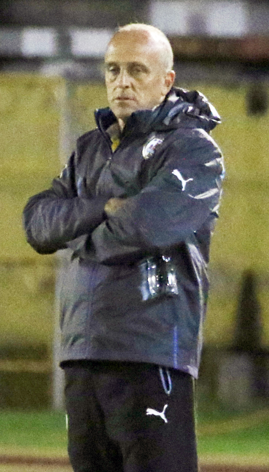 ARGENTINA URUGUAY 6 MAV